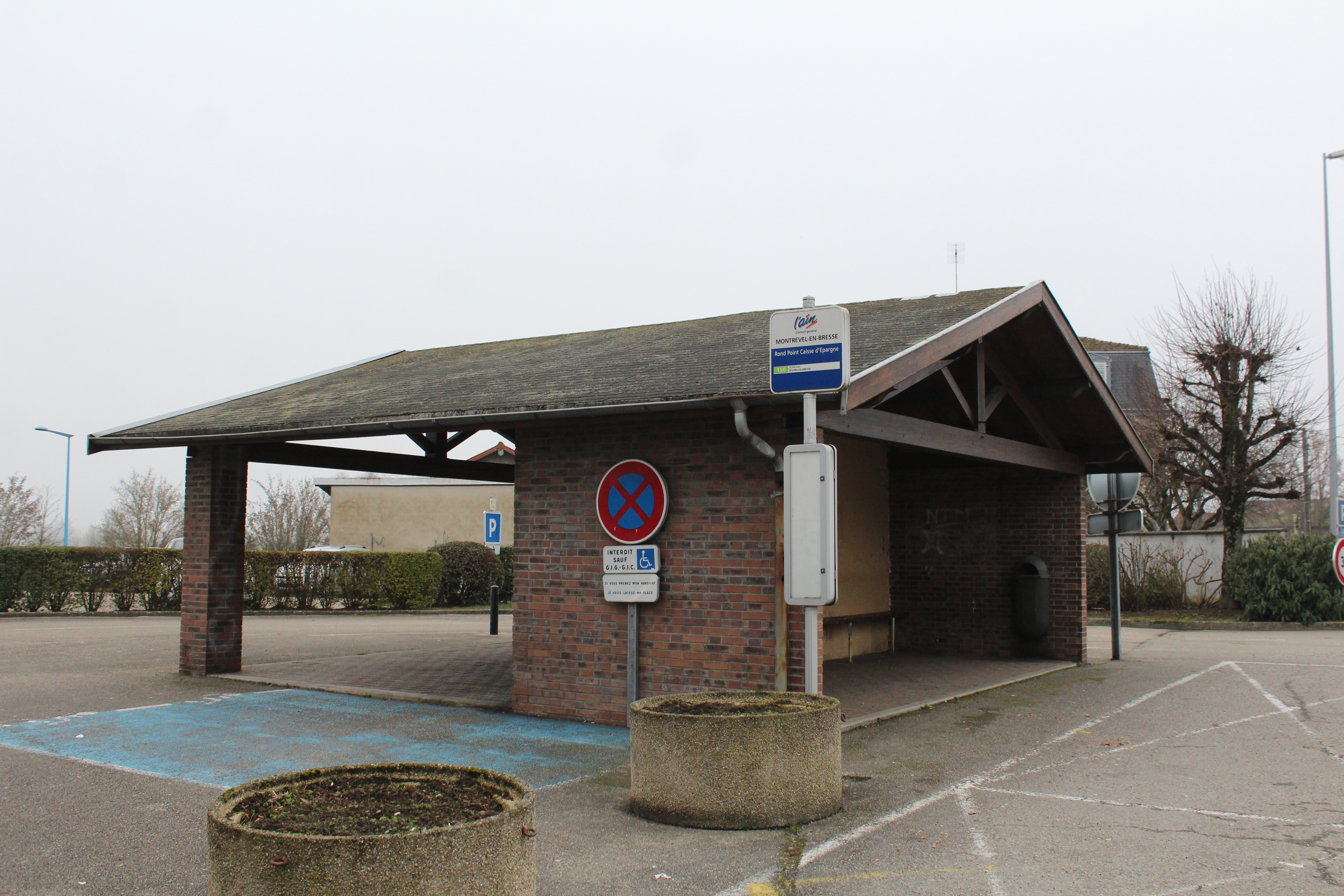 Arrêt "Rond-point Caisse d'Épargne" à Montrevel-en-Bresse.